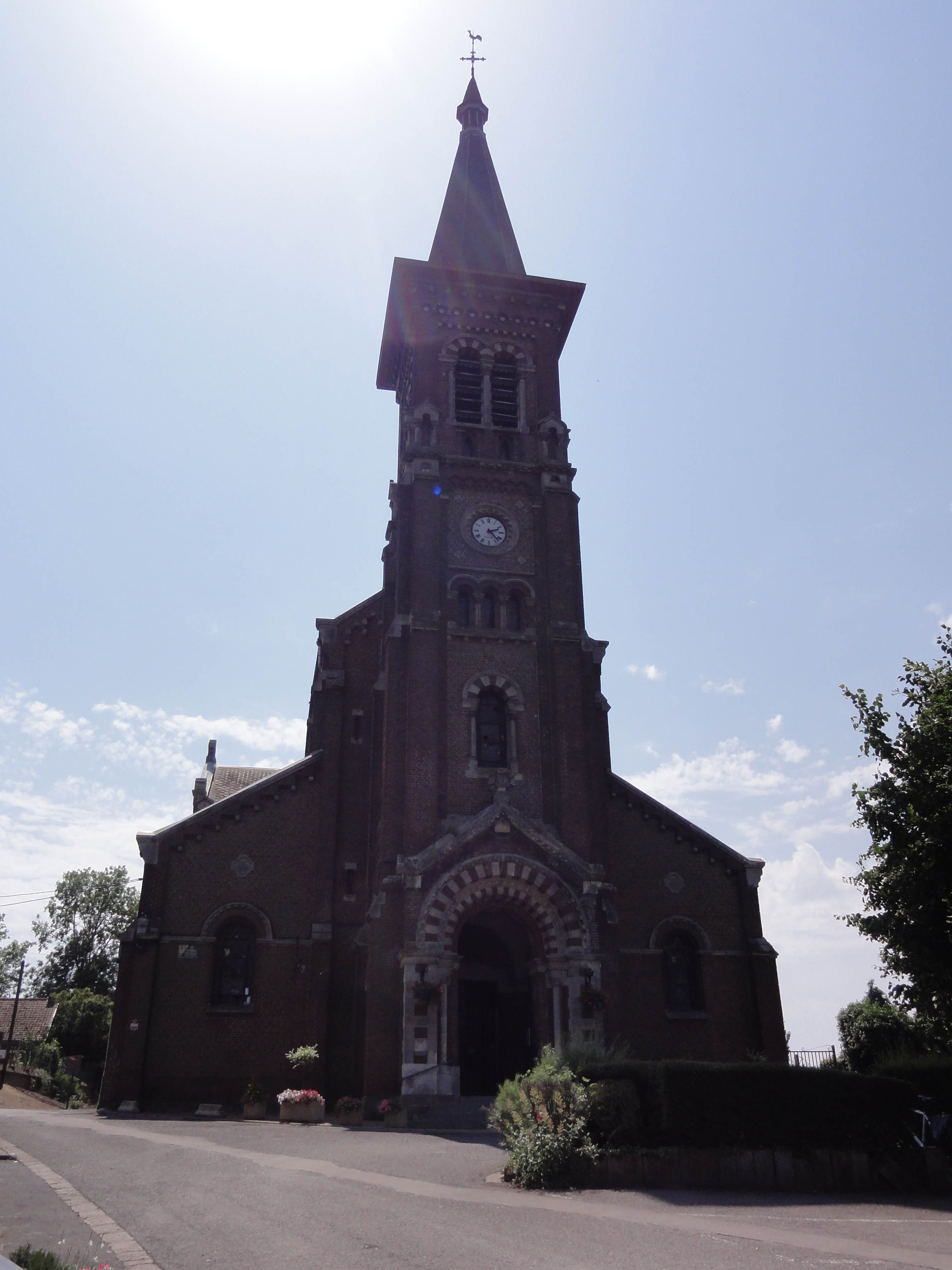 Préseau (Nord, Fr) église Ste Aldegonde, façade